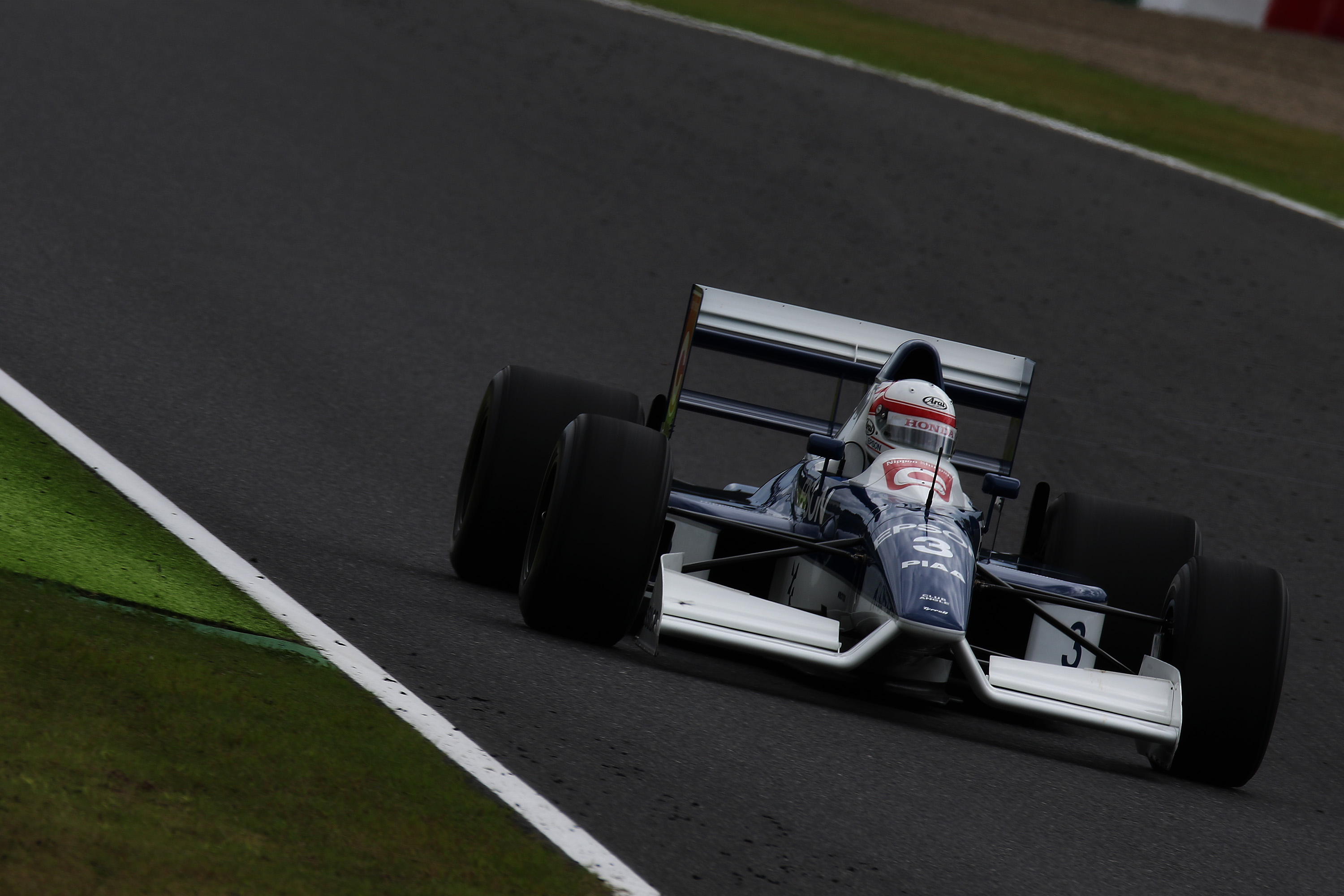 2015.9.26 F1 Rd.14 Suzuka Demonstration Run Driver: Martin Brundle レジェンドF1デモラン ティレル 019 中嶋 悟 [7D2_5560ks]